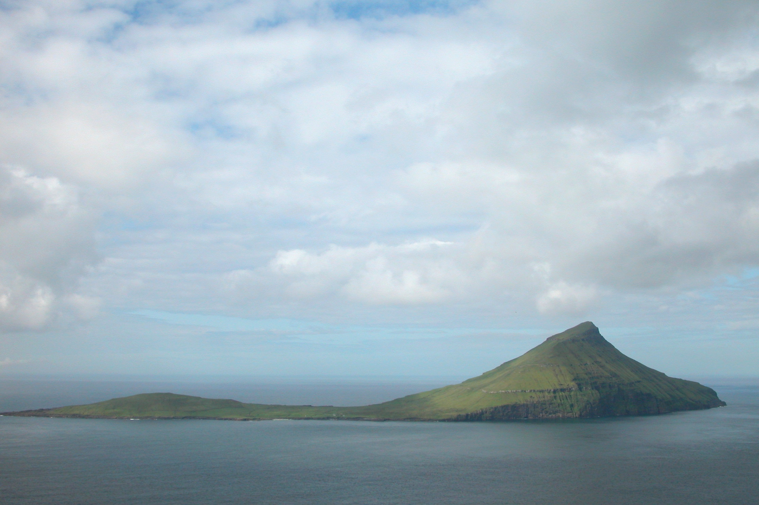 Koltur, Faroe Islands